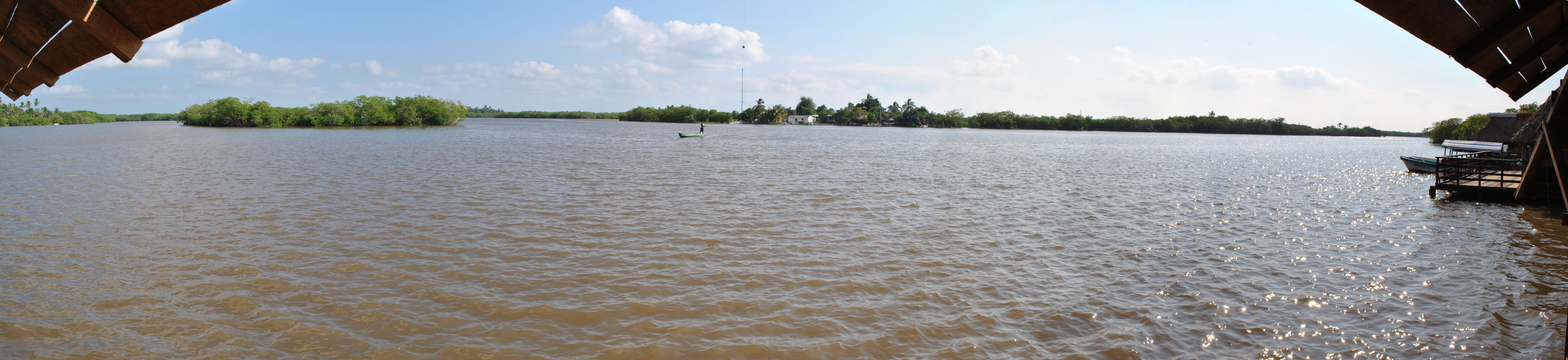 Vista de la Laguna de Mecoacán desde El Bellote, Paraíso, Tabasco, México. Unknown